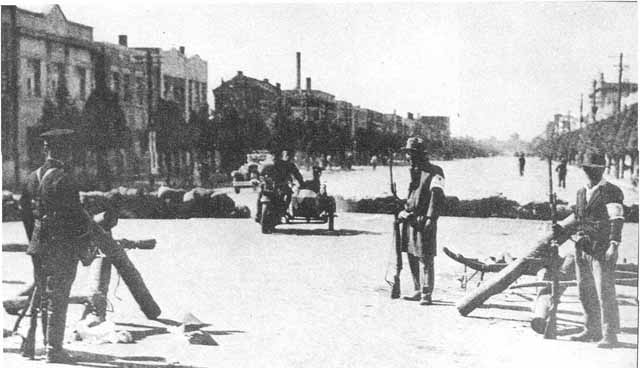 “九·一八”事变爆发后，日军占领下的沈阳市区，转载因特网：